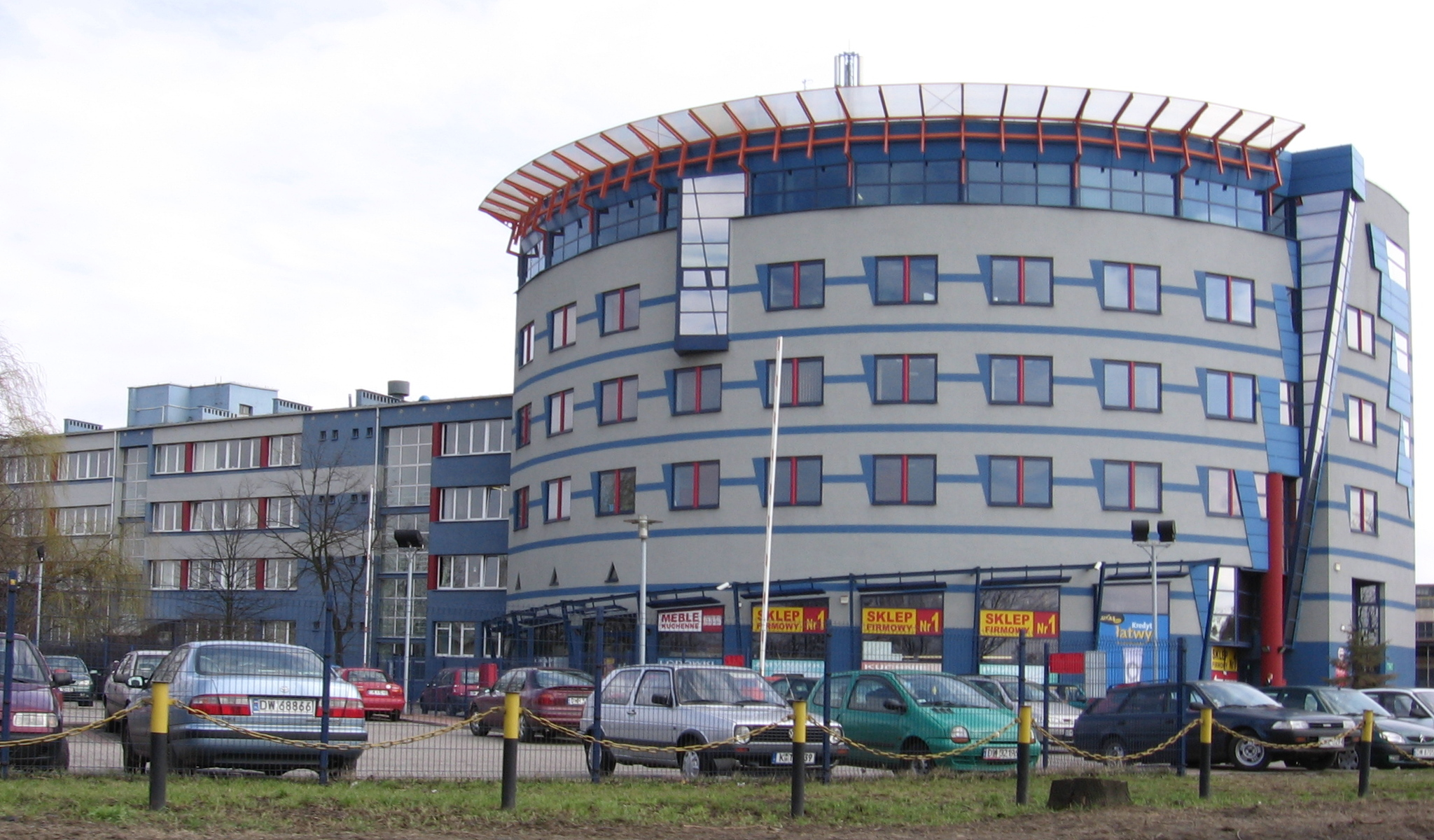 fabryka Fagor Mastercook (d. Wrozamet) we Wrocławiu, ul. Żmigrodzka